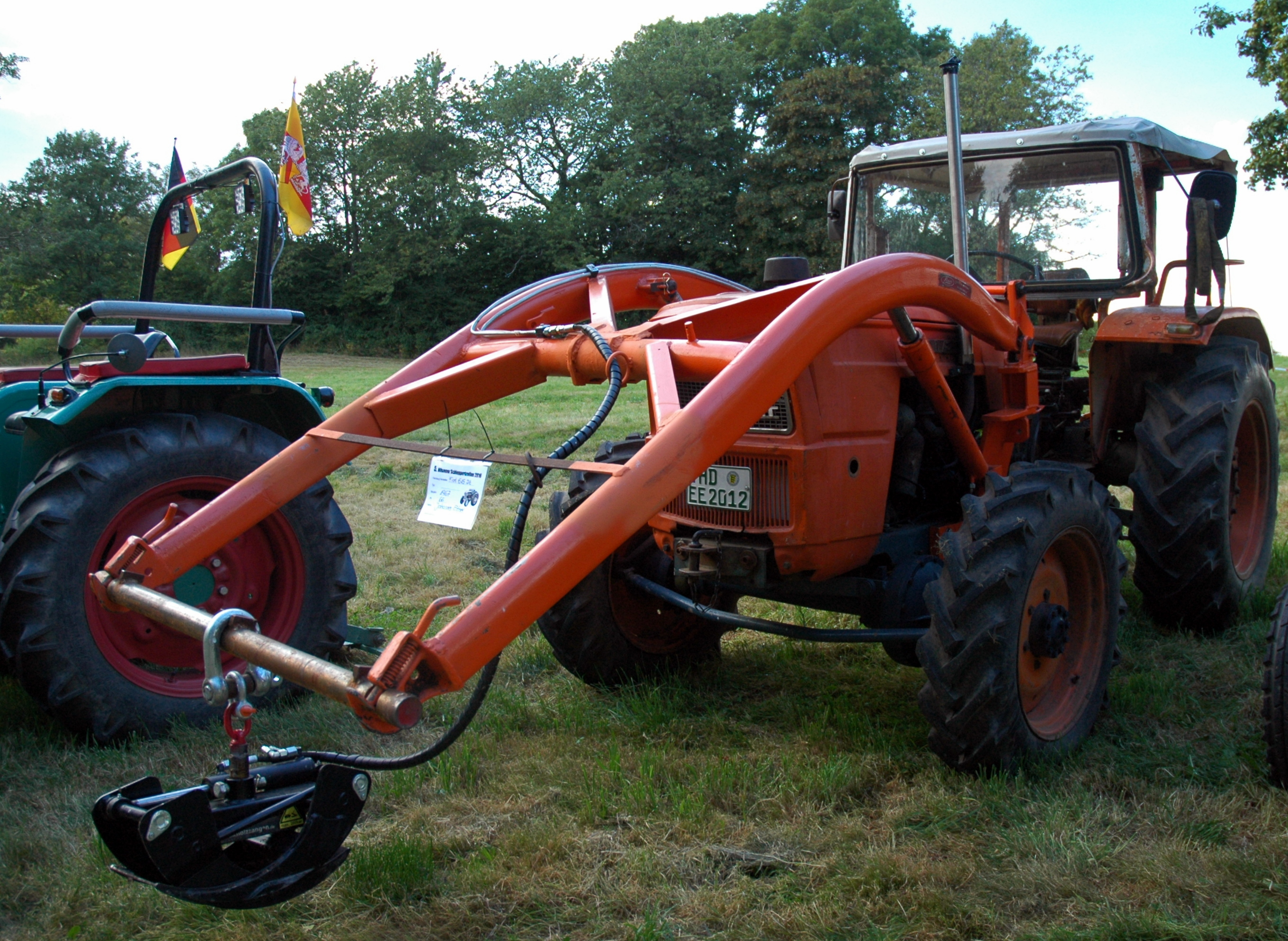 Heiligkreuzsteinach: 5. Hilsemer Schleppertreffen: Fiat 615 DT